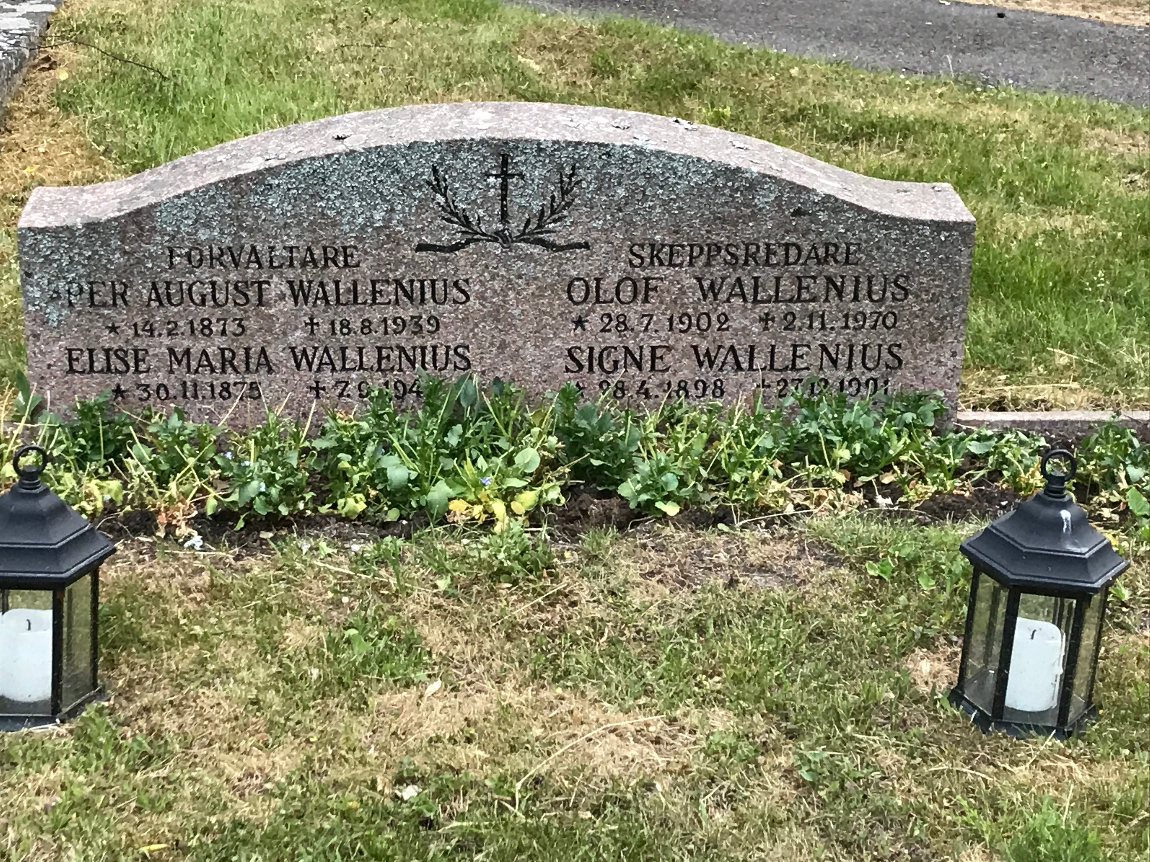 Solna, Sverige, June 2018